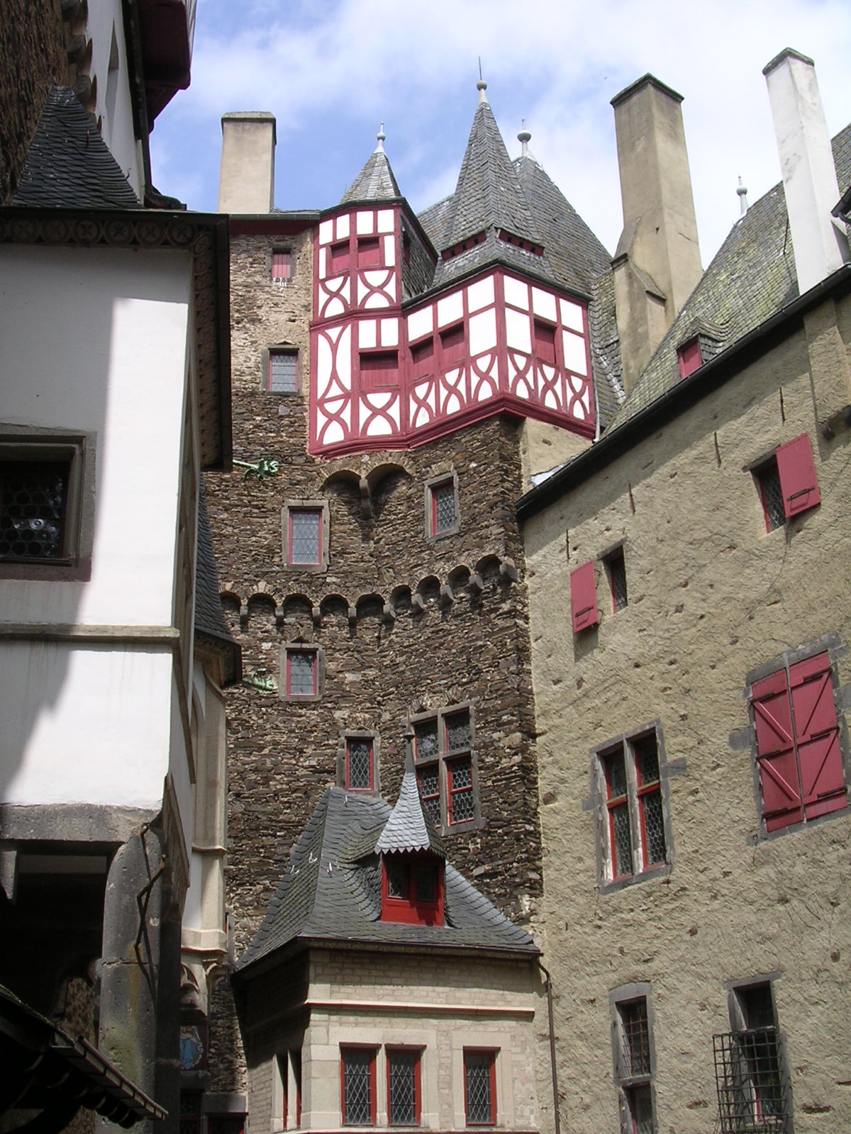 Im Innenhof der Burg Eltz